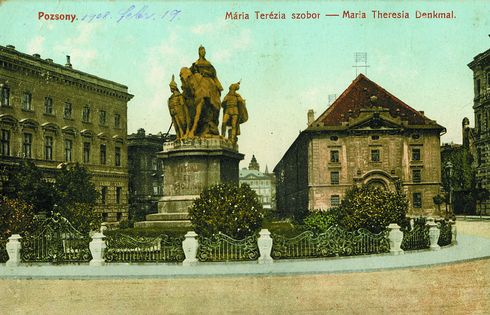 Mária Terézia emlékműve,Pozsony, 1908